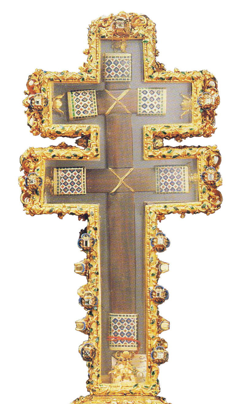 reliquiario1.jpg